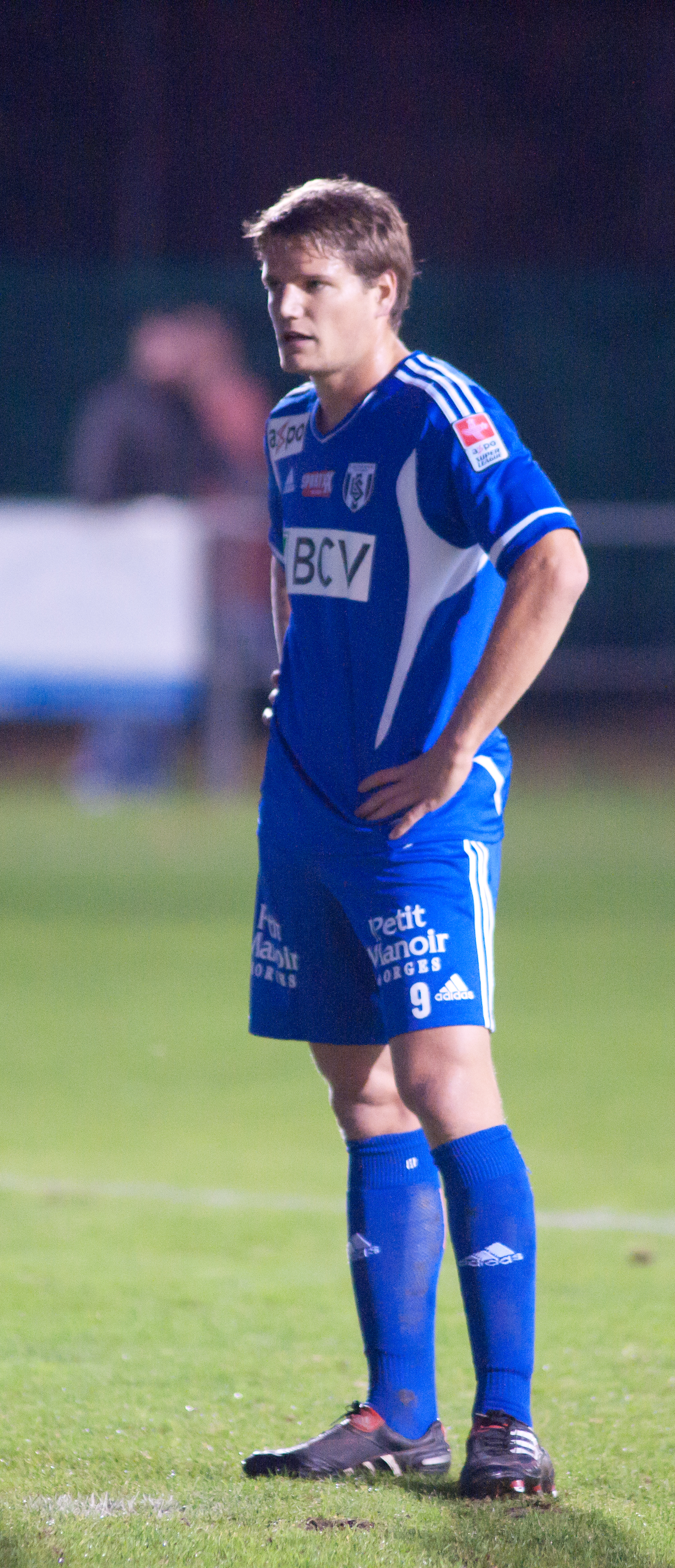 Jocelyn Roux avec le Lausanne Sport.